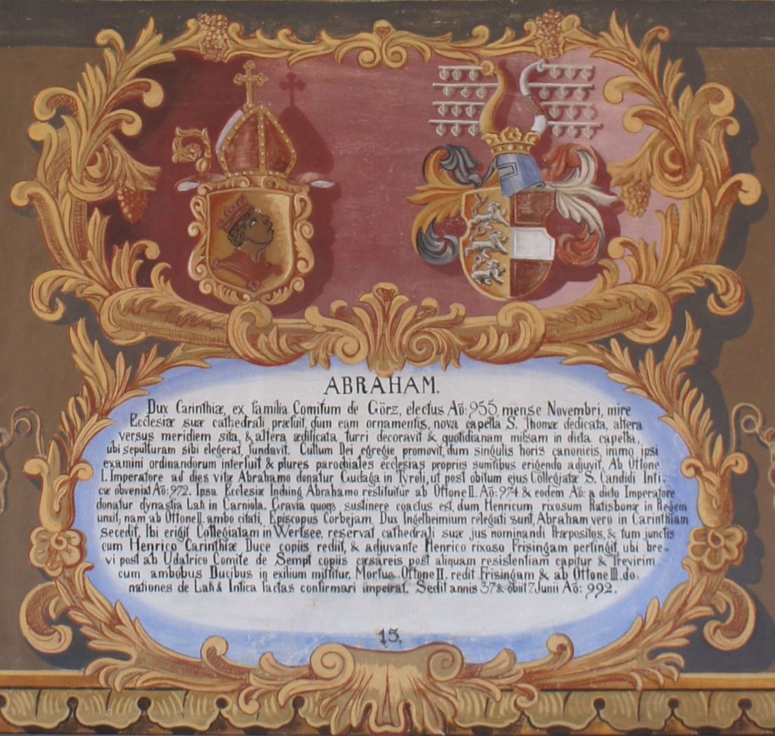 Wappentafel von Abraham, Bischof von Freising, im Fürstengang zwischen Fürstbischöflicher Residenz und Freisinger Dom. Links das geistliche, rechts das persönliche Wappen, darunter ein lateinischer Text mit kurzer Biographie.